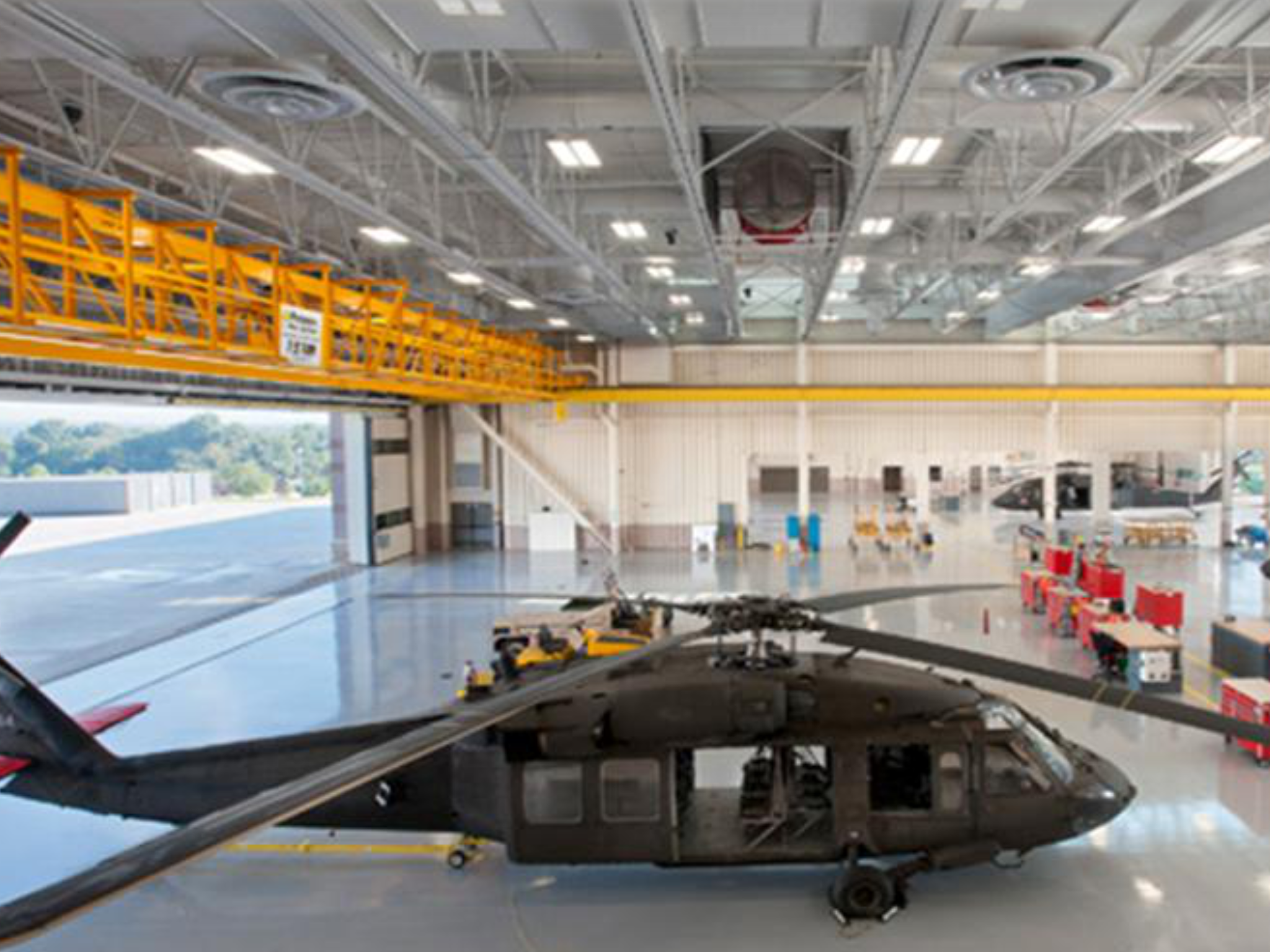 No piso do pátio interno do hangar será utilizada uma pintura epóxi, com espessura 0,5mm. Revestimento do piso com resina epóxi curada com amina alifática, com pintura monolítica resistentes à corrosão de ácidos e solventes proveniente da manutenção das aeronaves.